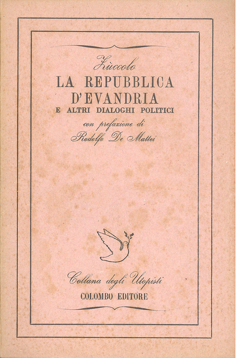 Copertina del libro La repubblica d'Evandria (1625) di Ludovico Zuccolo (1568 – 1630). Edizione del 1944.